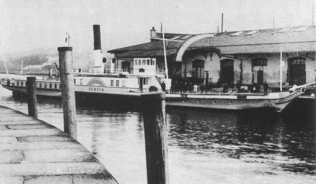 Der ehemalige Dampfer "Stadt Zürich", jetzt nur noch "Zürich", in Rorschach